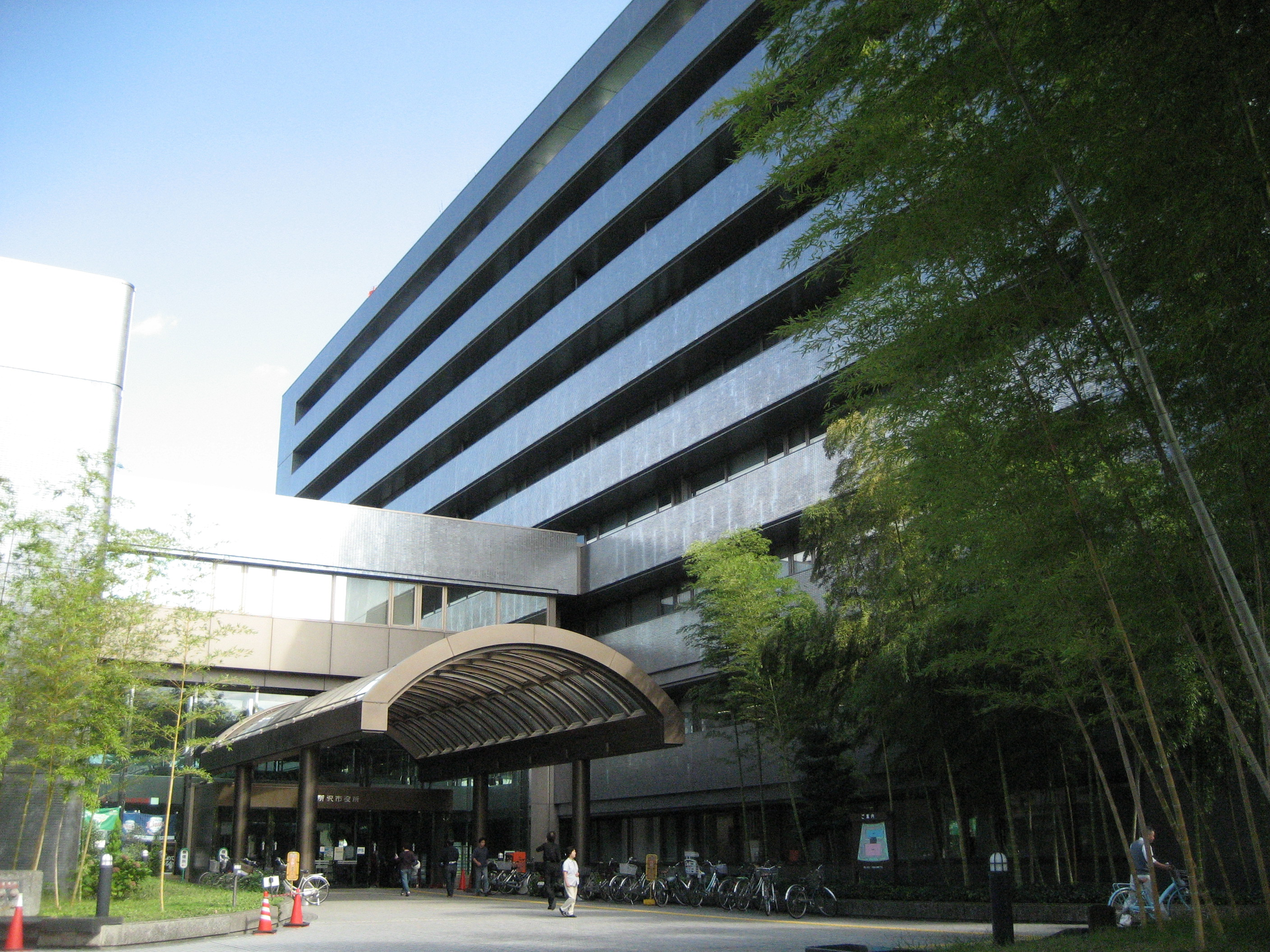 所沢市役所庁舎